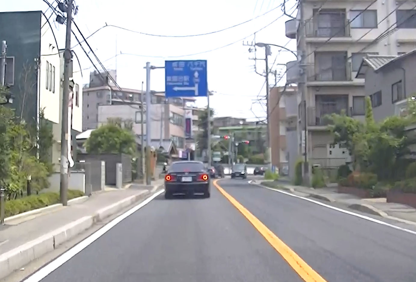 国道296号（薬園台駅付近）